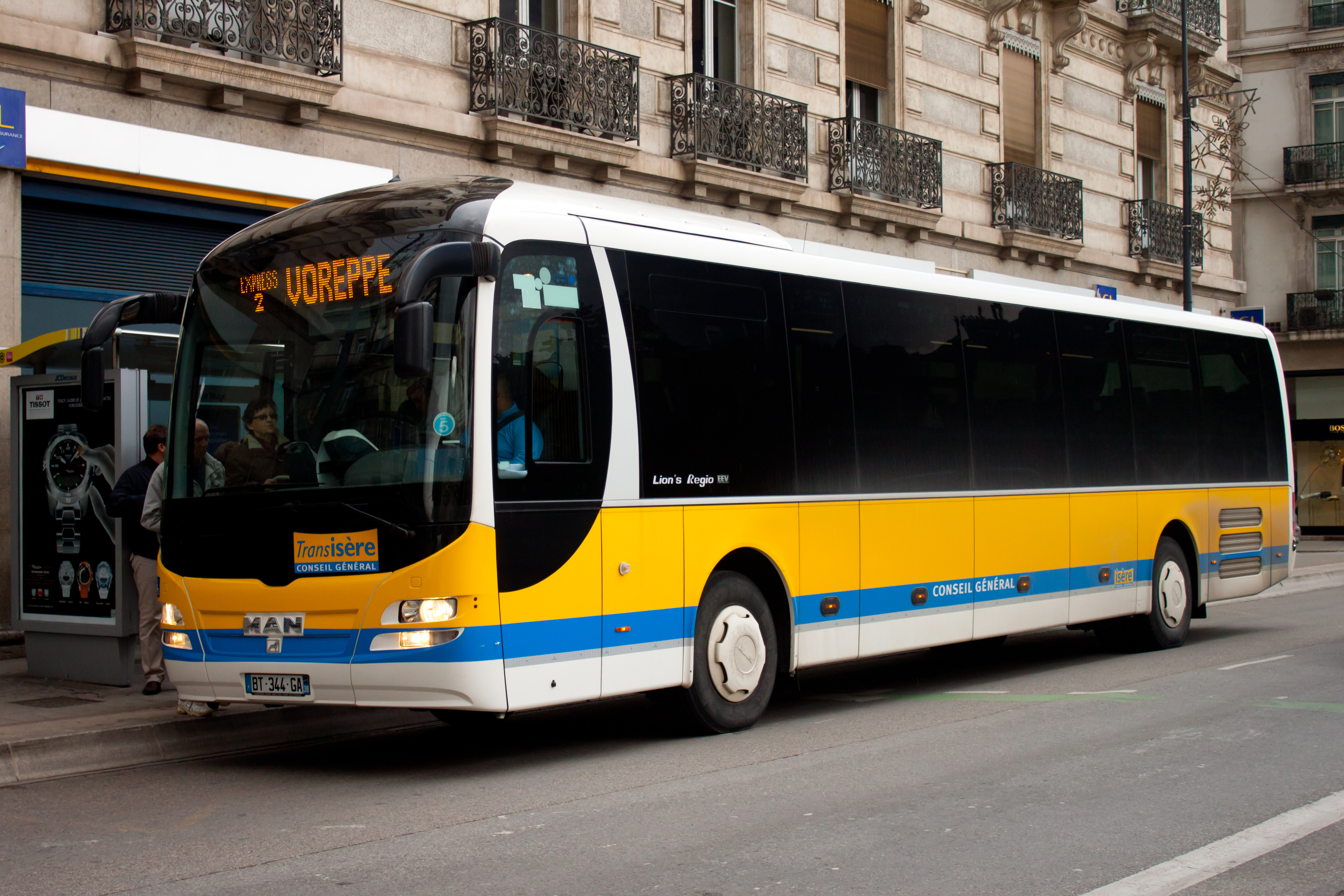 Un MAN Lion's Regio de Car Postal circulant sur l'Express 2 à l'arrêt Victor-Hugo à Grenoble